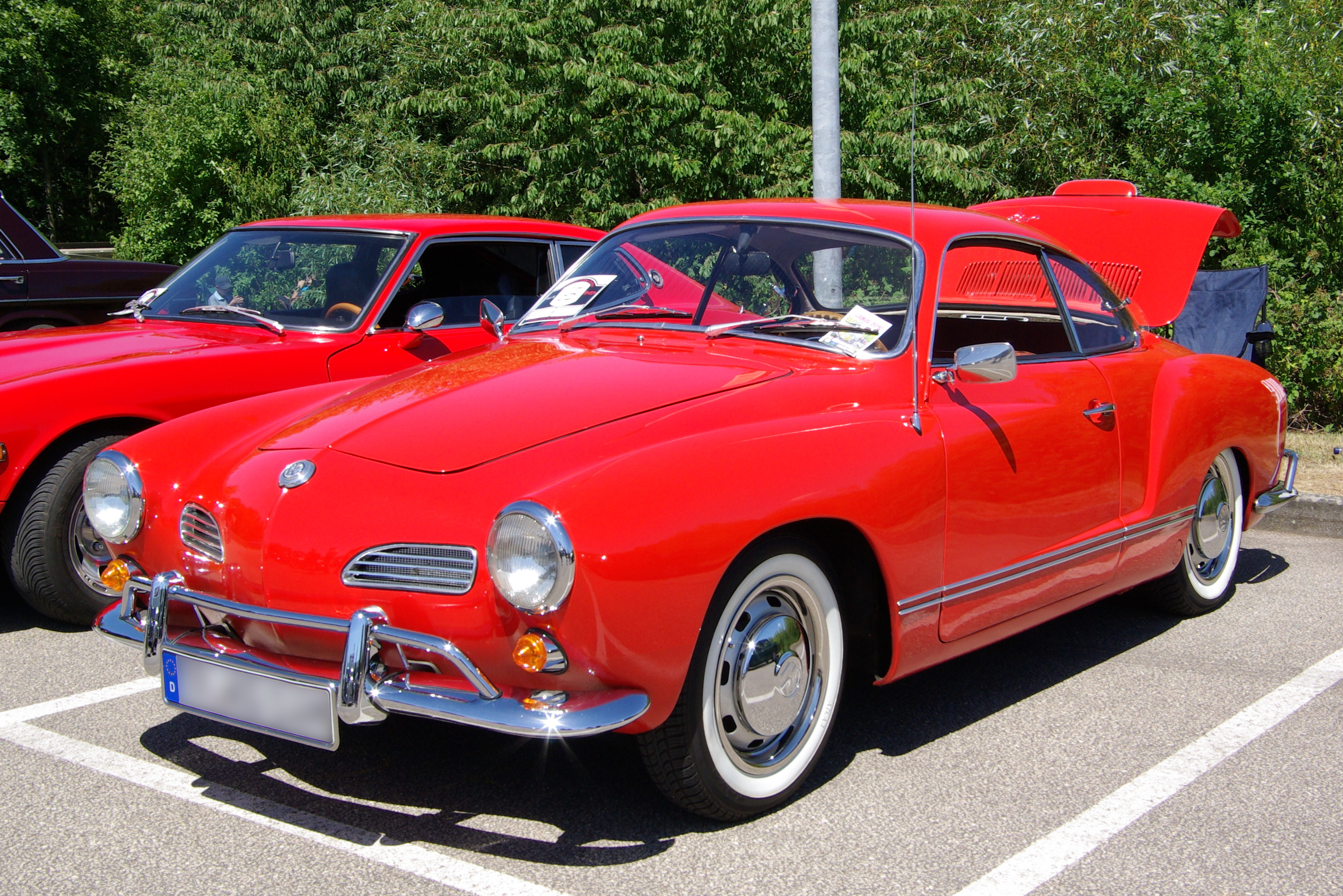 Karmann Ghia Typ 14, Baujahr 1968, 40 PSaufgenommen bei / photographed at "Internationales Konzer Oldtimer-Treffen", 18. Juli 2010